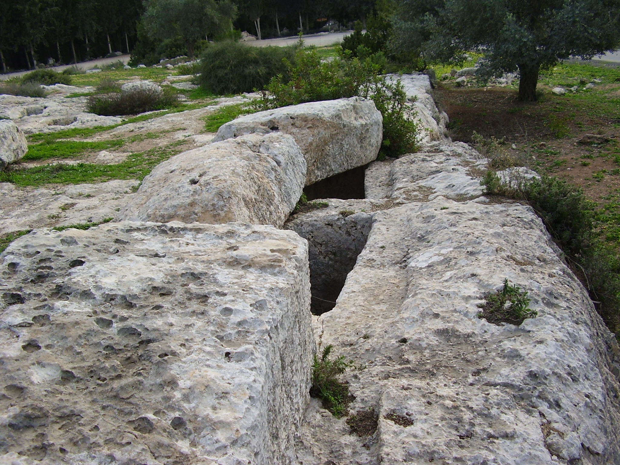 "קברות המכבים" ביער בן שמן